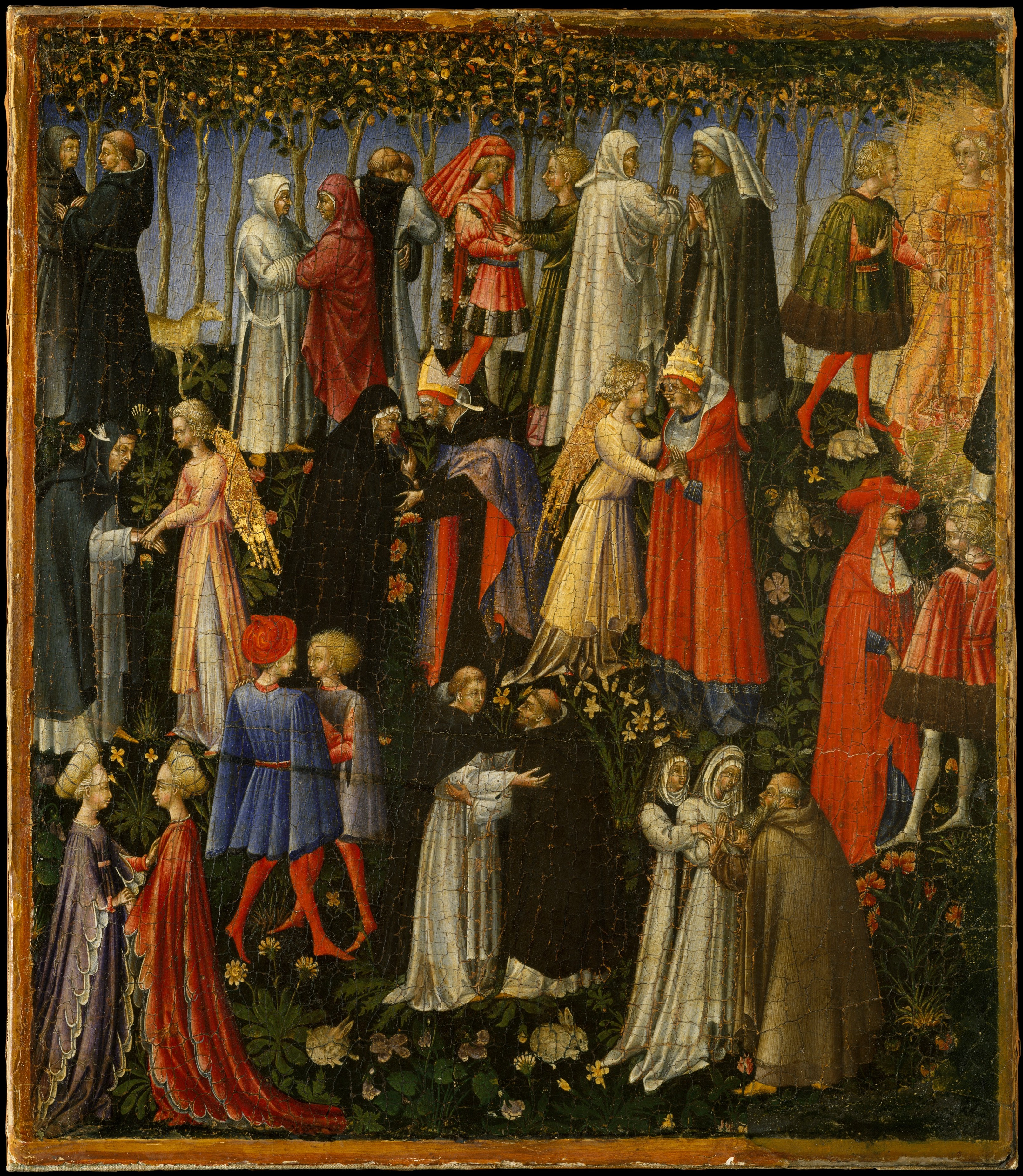 Painting, predella panel; Paintings